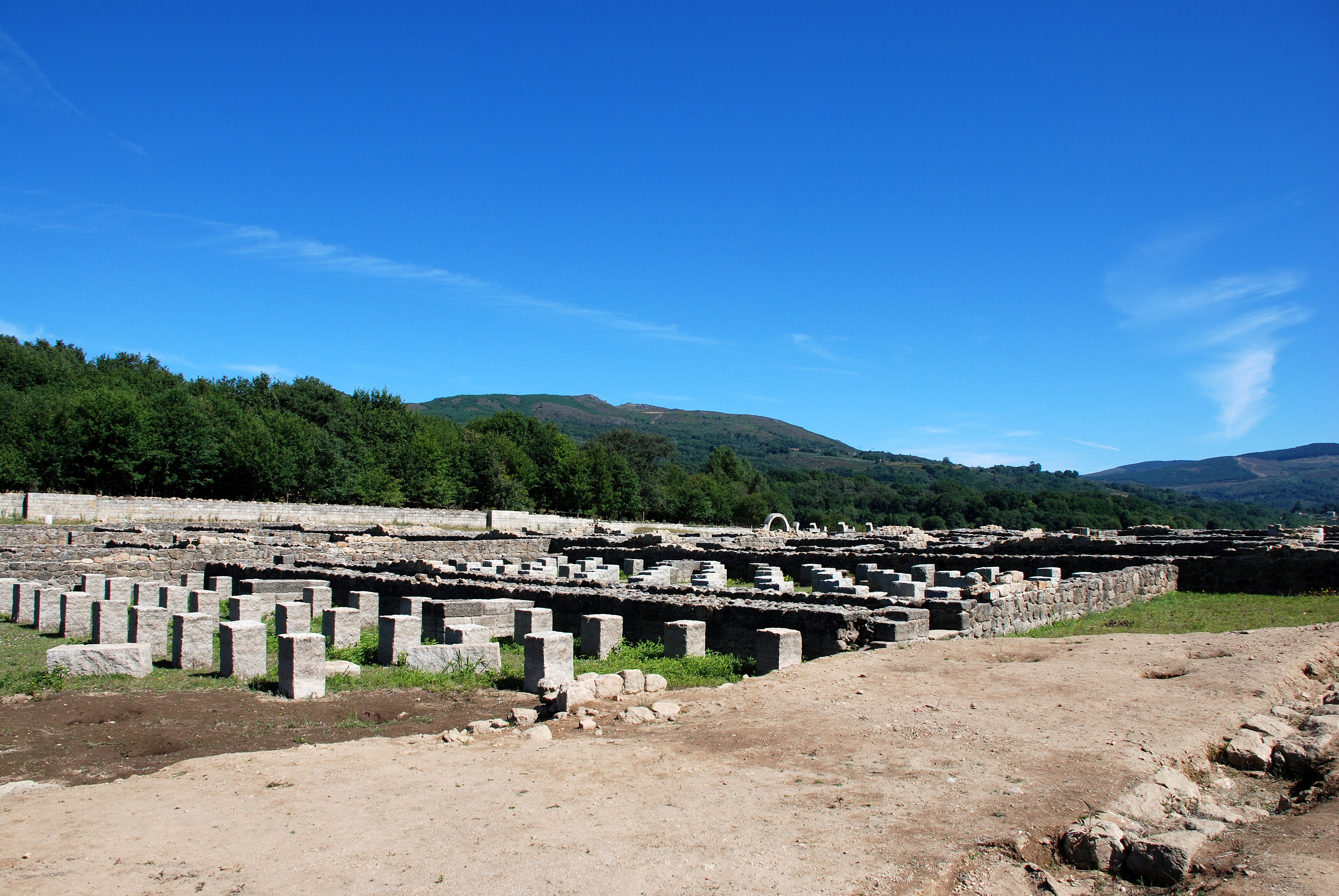 Aquis Querquennis = campamento romano, perto da atual vila de Bande (Galiza). Nos nossos tempos fica enterrado parcialmente pelas águas da barragem